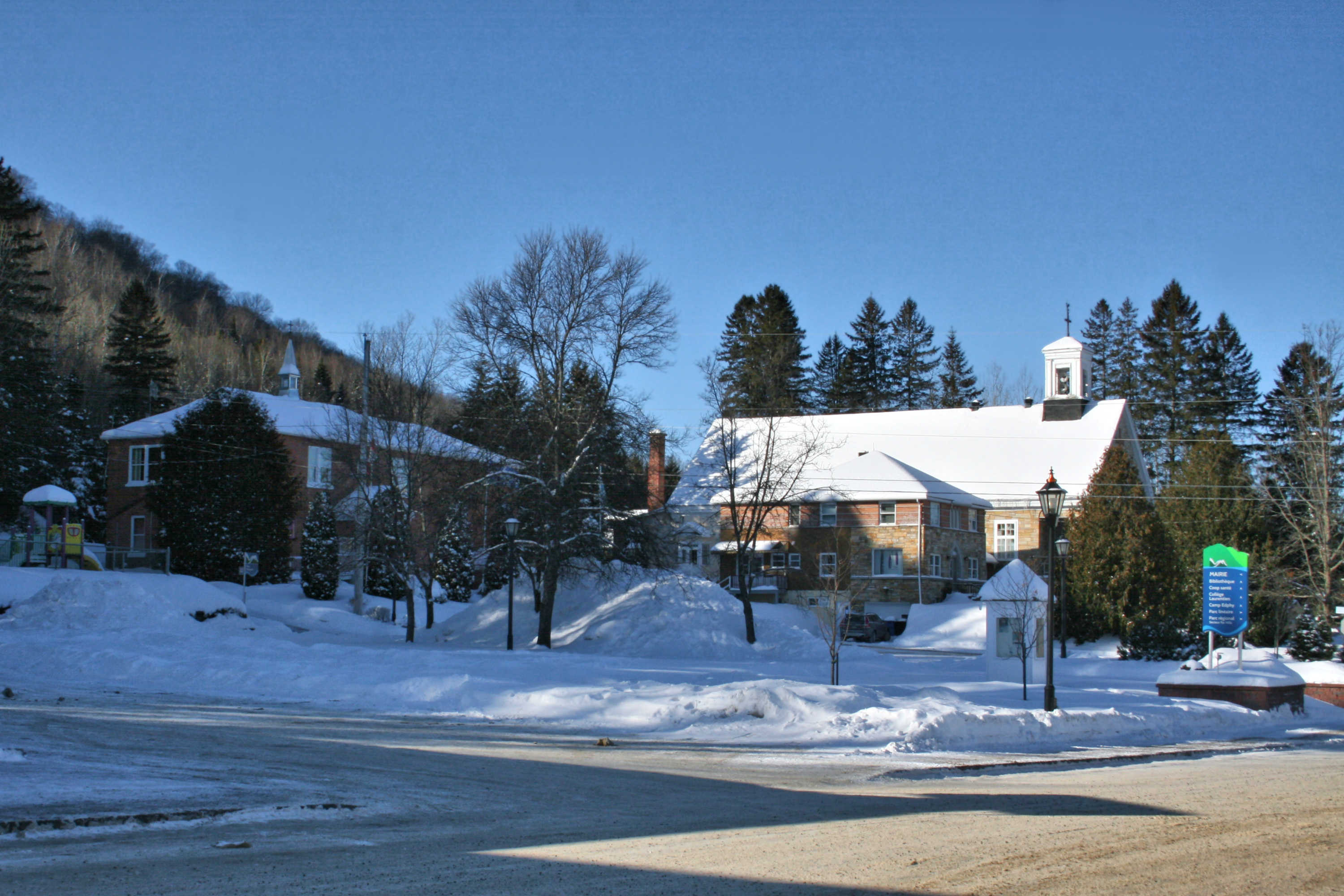 Val-Morin, Quebec, Canada